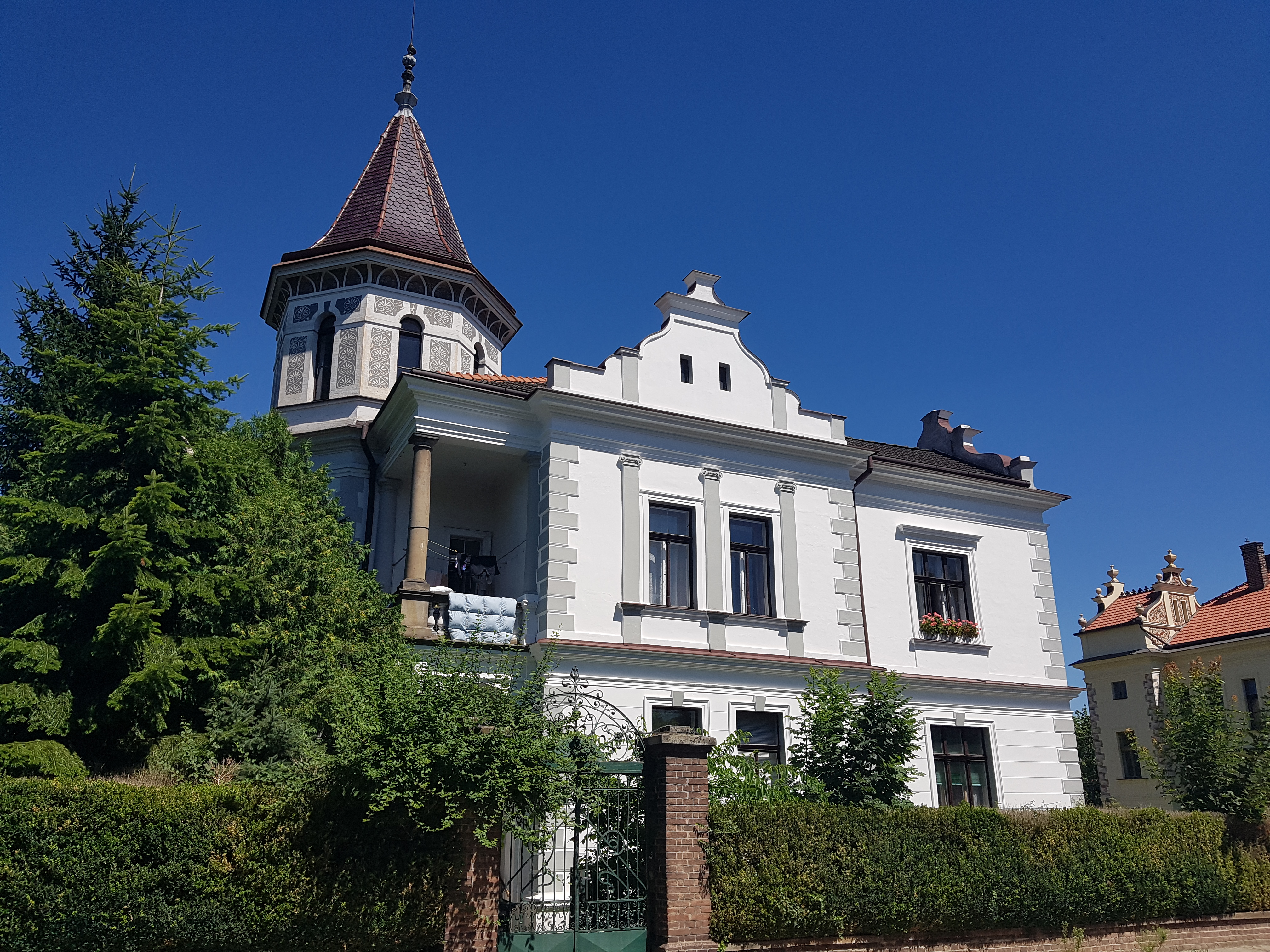 Vila Morušovka v Hradci Králové (2020)